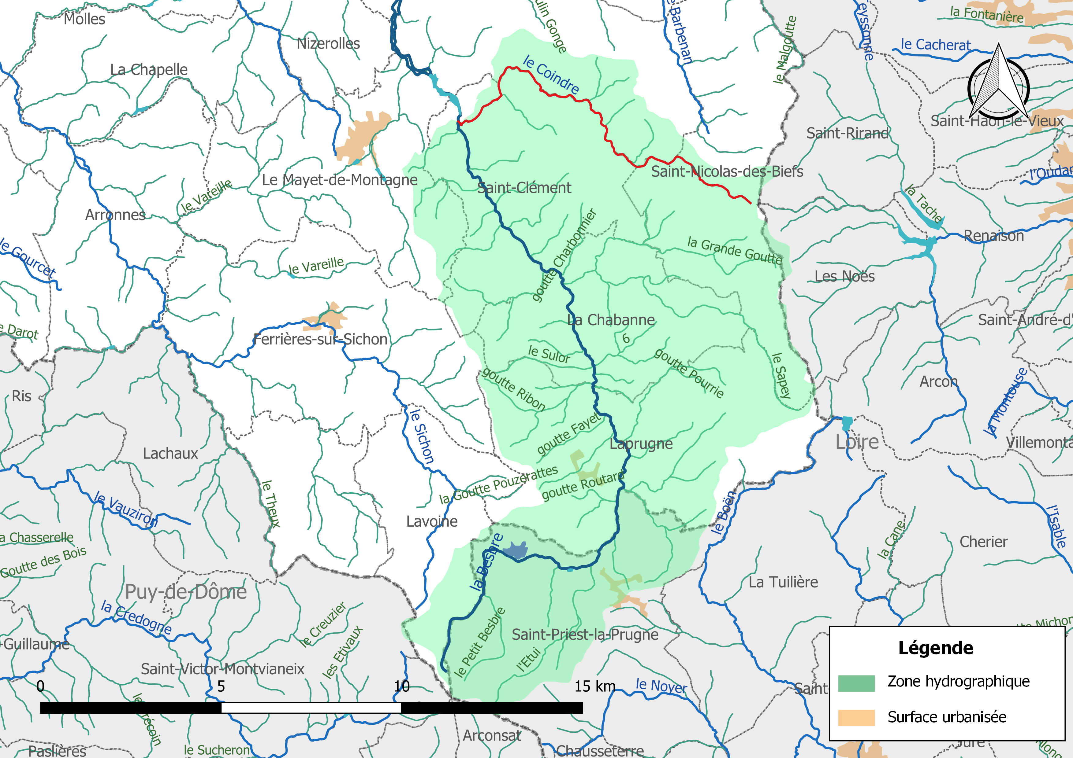 Carte du cours d'eau « le Coindre » (France) et de la zone hydrographique dans laquelle il s'insère.